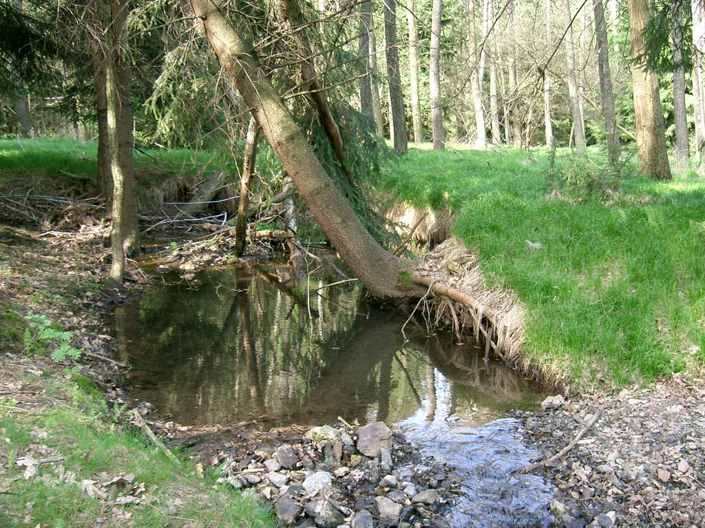 Bächlein Pitzsche im Zellwald bei Nossen